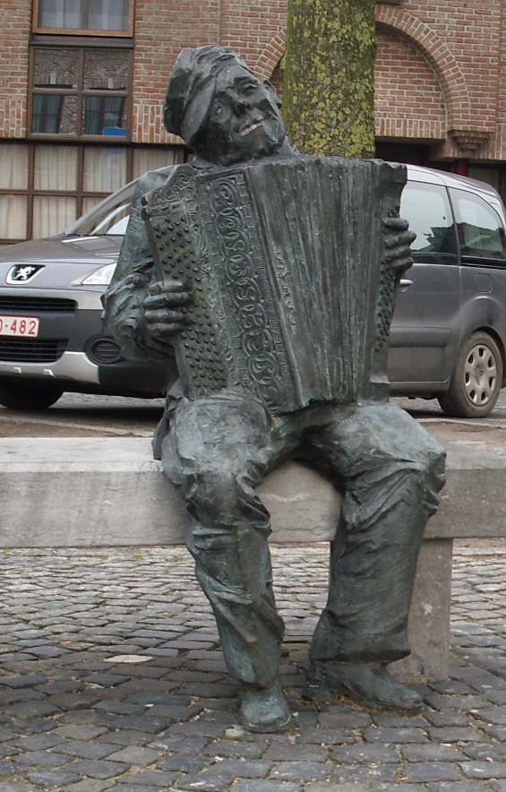 Lionel Bauwens - Kerkplein - Eeklo - Oost-Vlaanderen - Vlaams Gewest - België